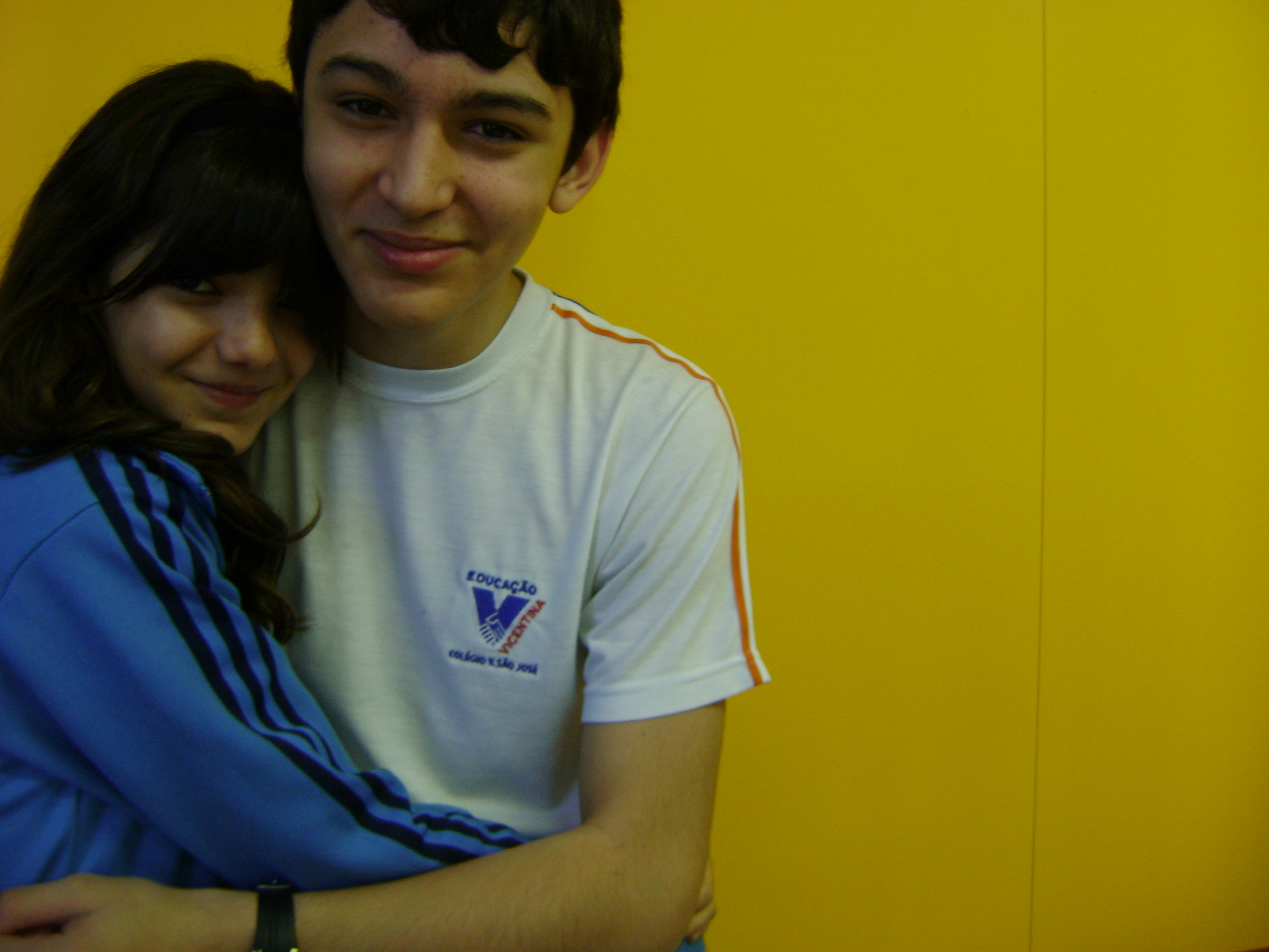 foto minha e de minha namorada.